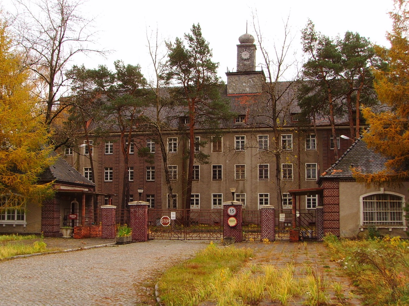 Dawne koszary 5 pułku artylerii przeciwlotniczej z Gubina (10 lat po rozwiązaniu jednostek)